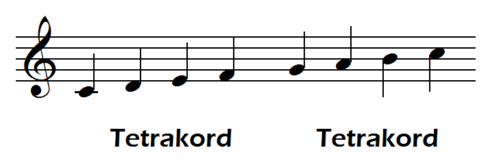 Notskrift, diatonisk skala, tetrakord